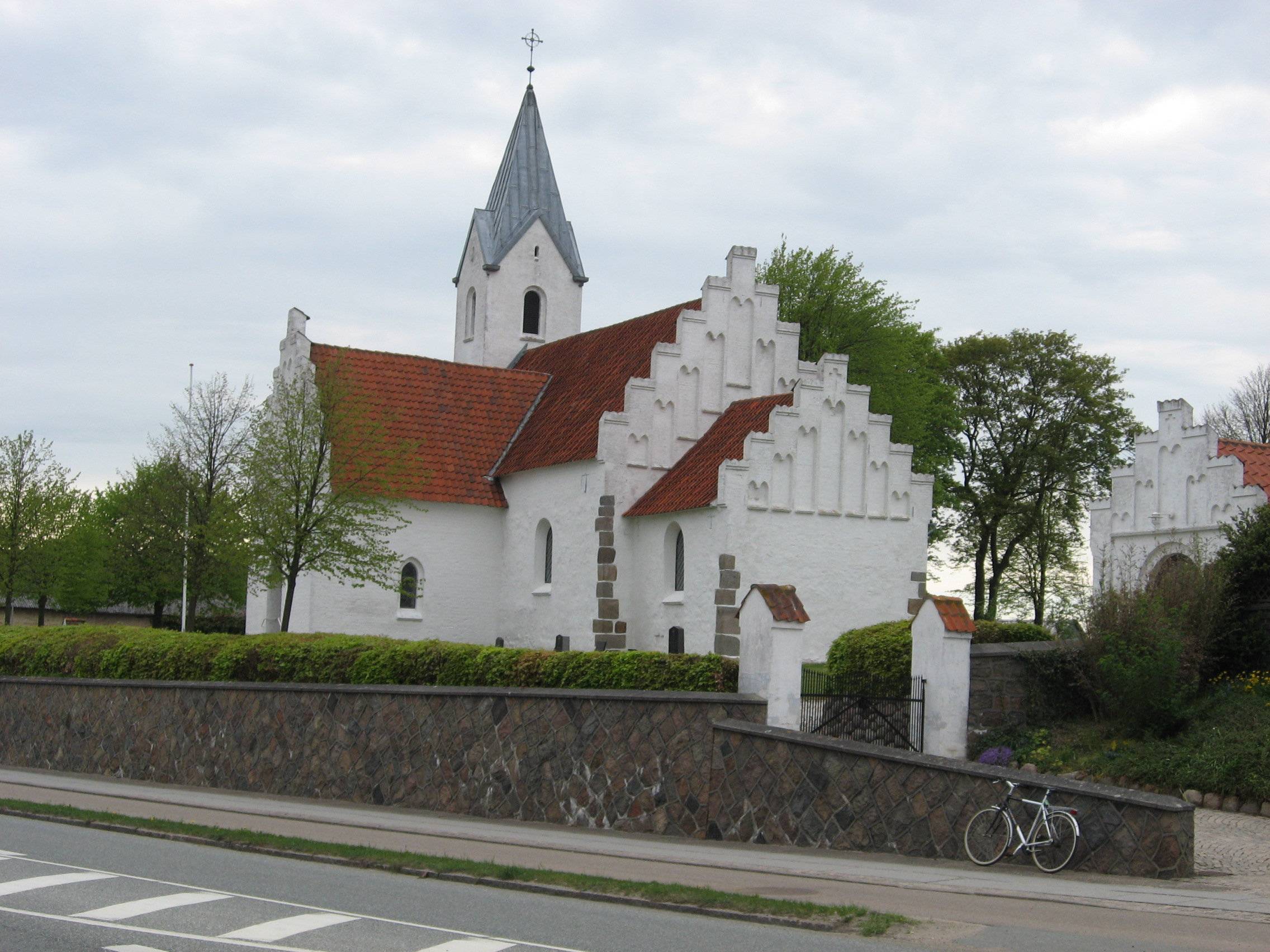 Sønder Aarslev Kirke in Sønder Årslev Sogn, Denmark.